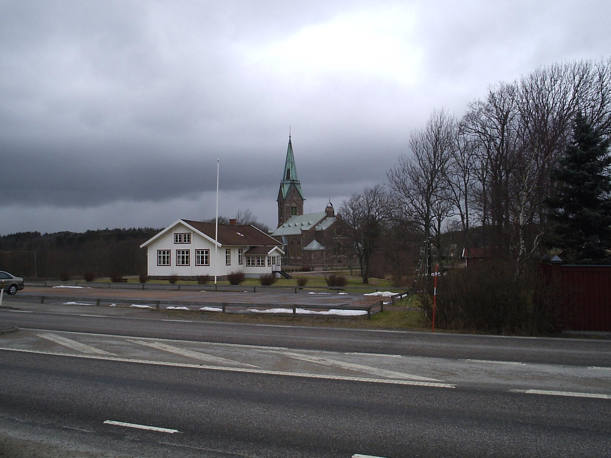 Bokenäs nya kyrka i Uddevalla kommun. Bilden är fotograferad 7 april 2006, av Harri Blomberg.